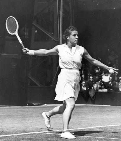 Turniej tenisowy na kortach Wimbledonu